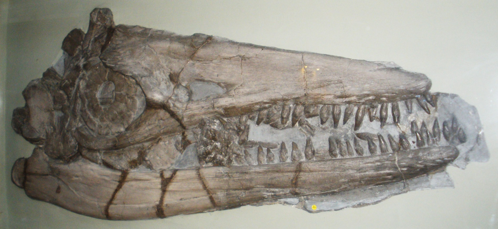 Fossil of Temnodontosaurus, an extinct reptile-- Took the photo at Natural History Museum, London